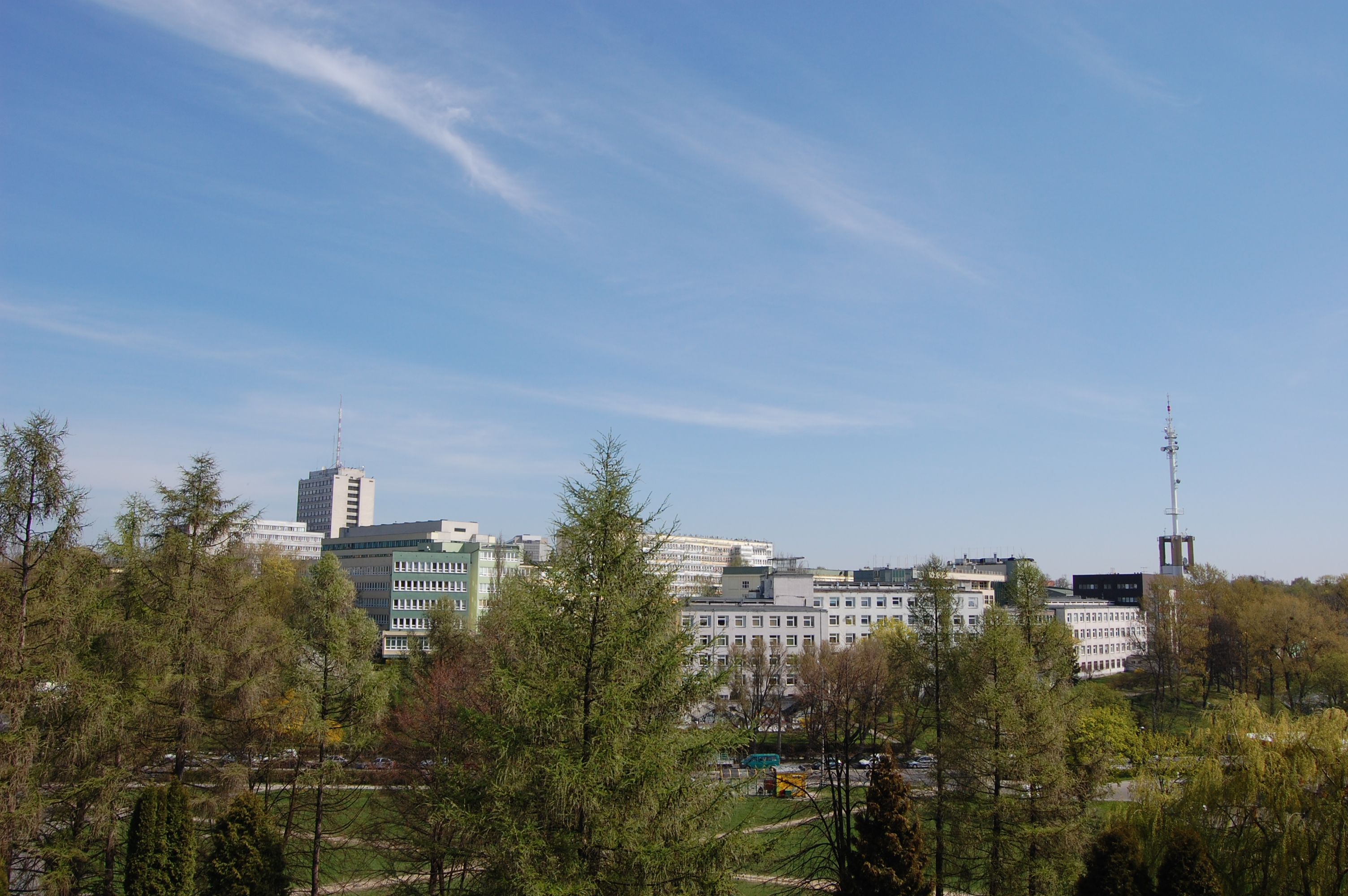 UMCS, Uniwersytet Przyrodniczy i RTON w Lublinie